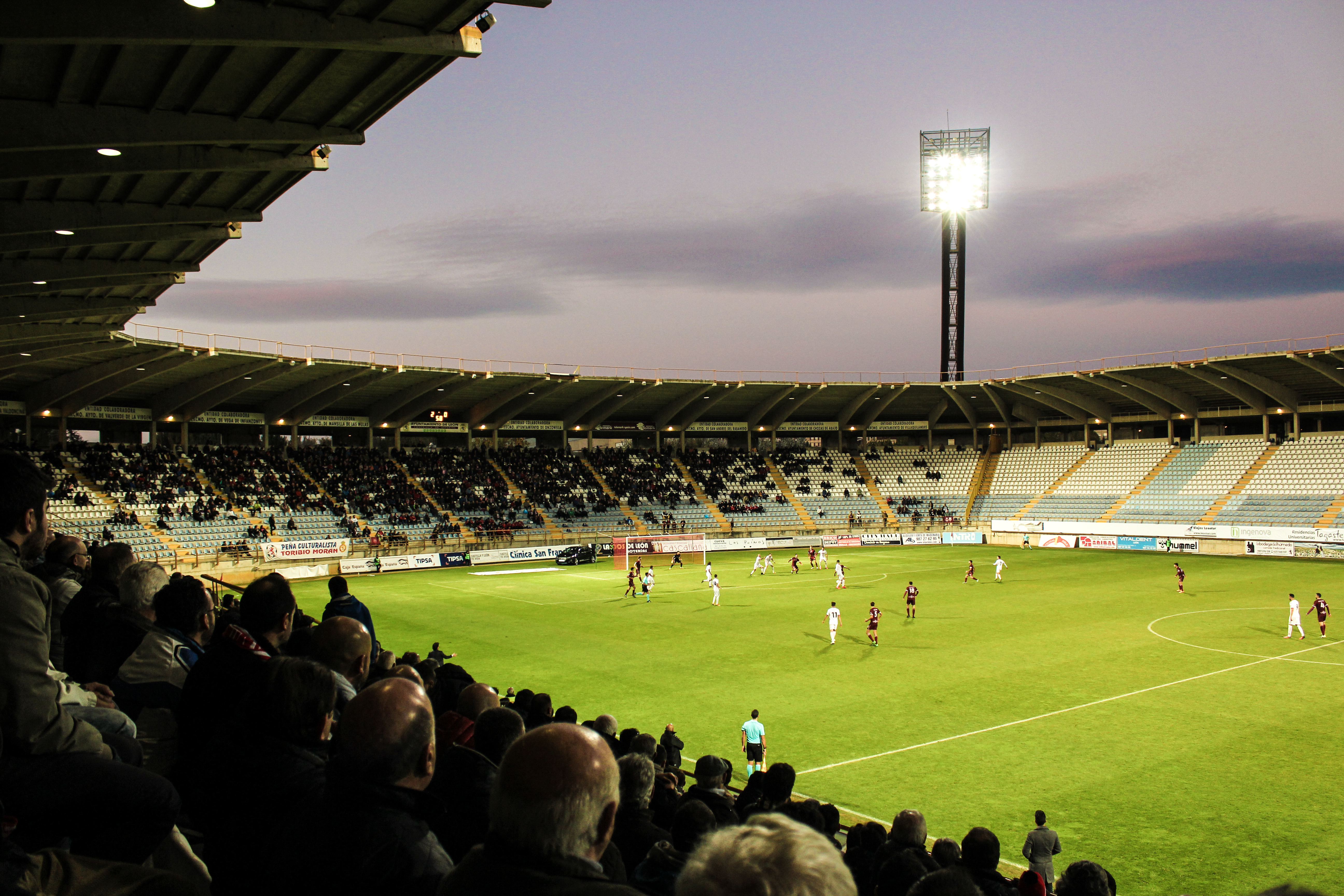 Partido de la cultural y deportiva leonesa contra el Pontevedra en el Reino de León.